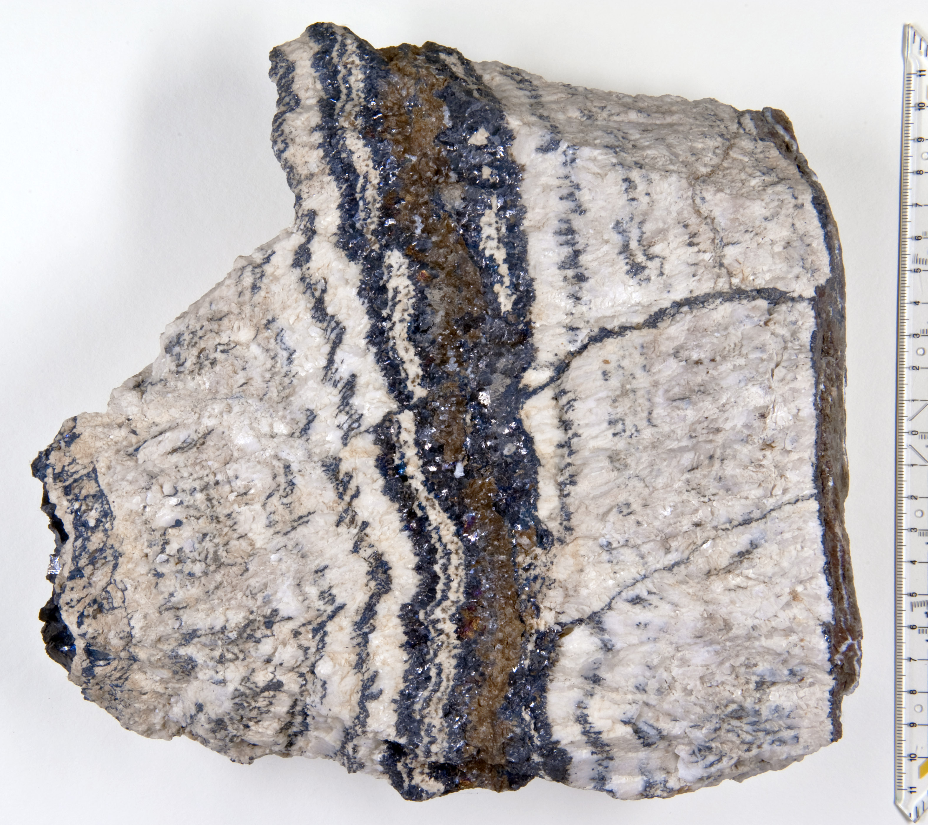 Galenite, Sphalerite - Grube Hilfe Gottes, Bad Grund, Harz, Germany